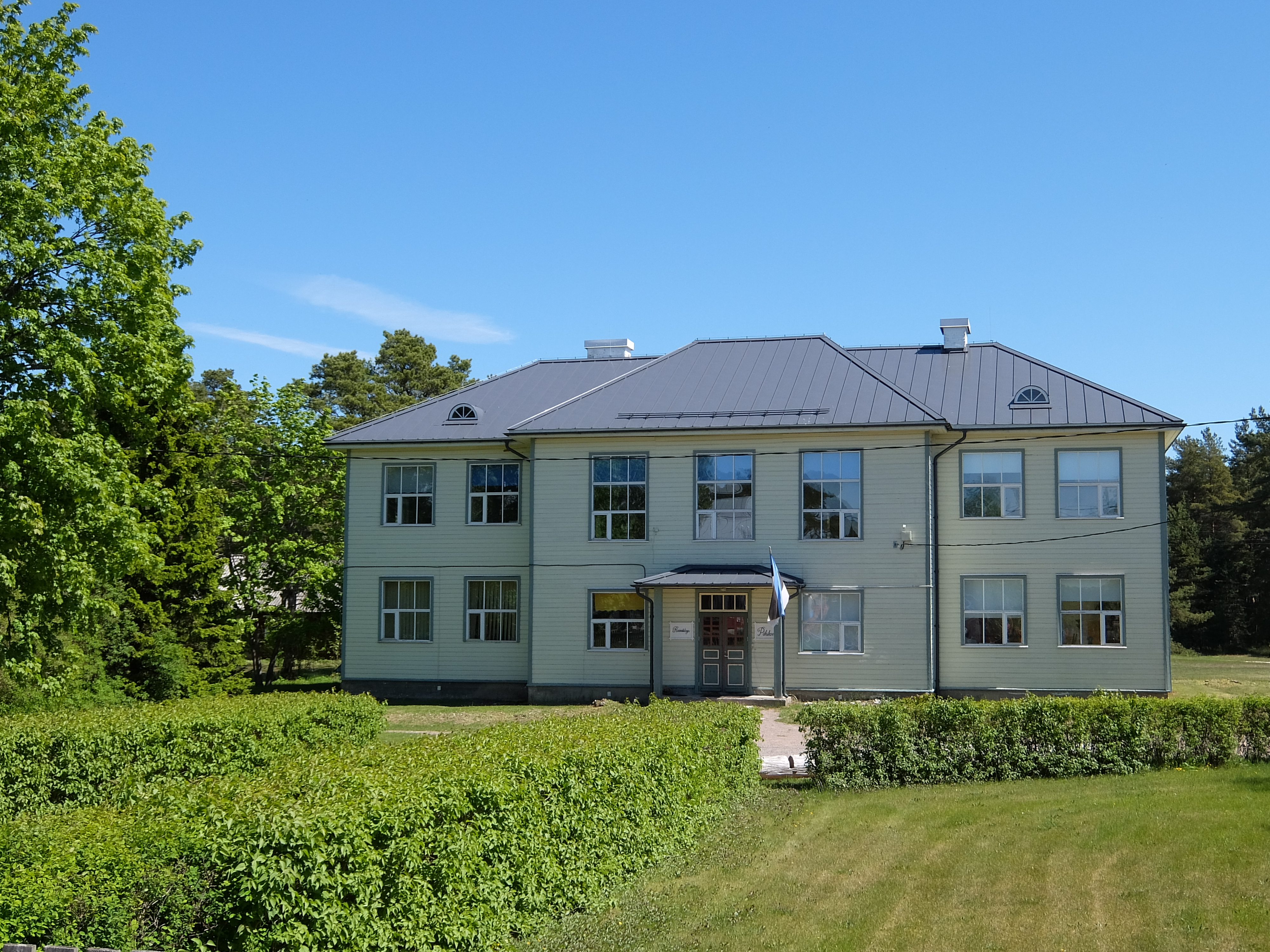 Vormsi koolimaja